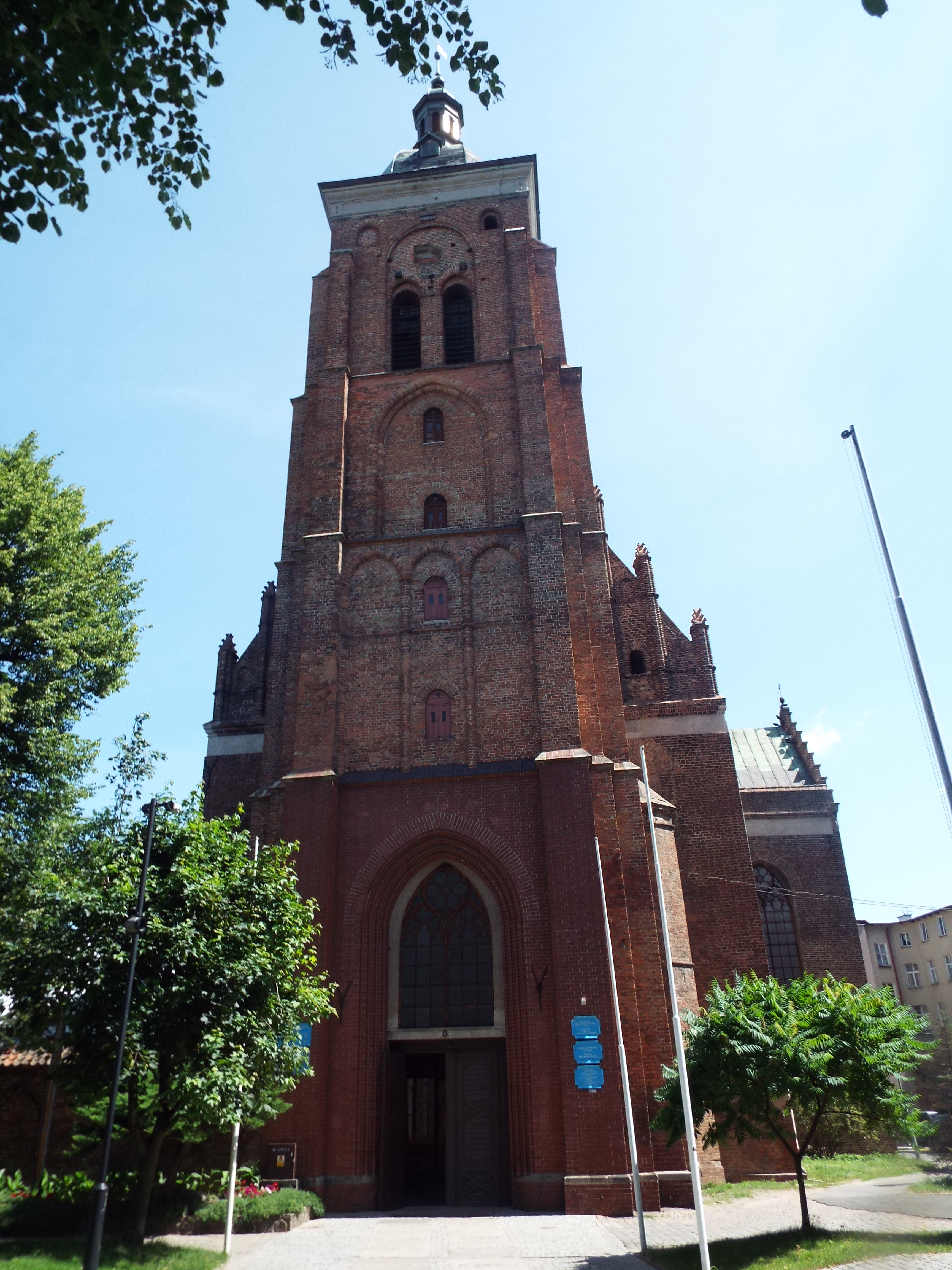 Gdańsk Stare Miasto, ul. Zaułek św. Bartłomieja 1 - Konkatedra greckokatolicka św. Bartłomieja i Opieki Najświętszej Bogurodzicy, 1486-1494, po 1945